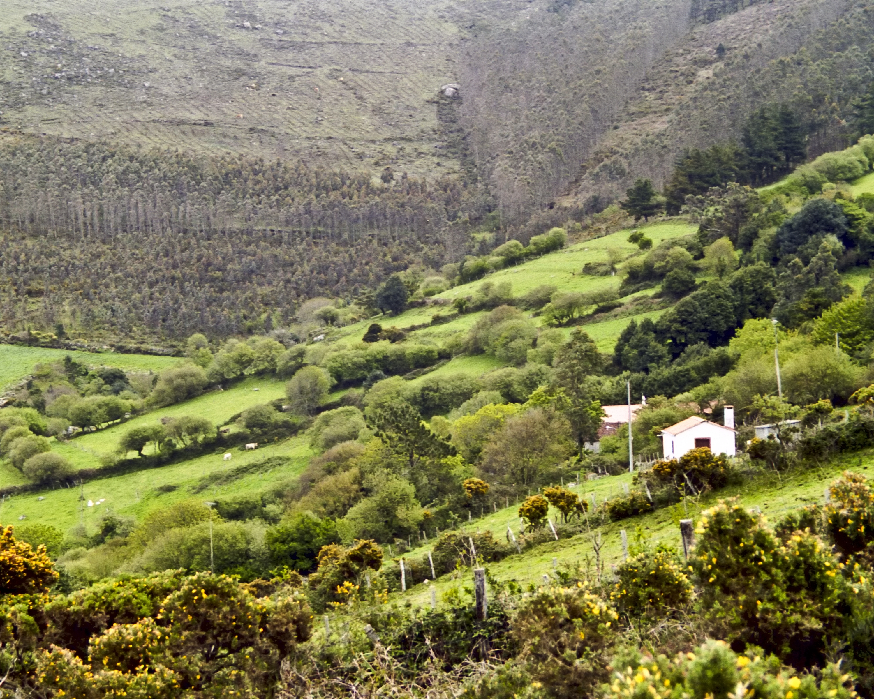 Cedeira, Galicia (Spain). Granxa